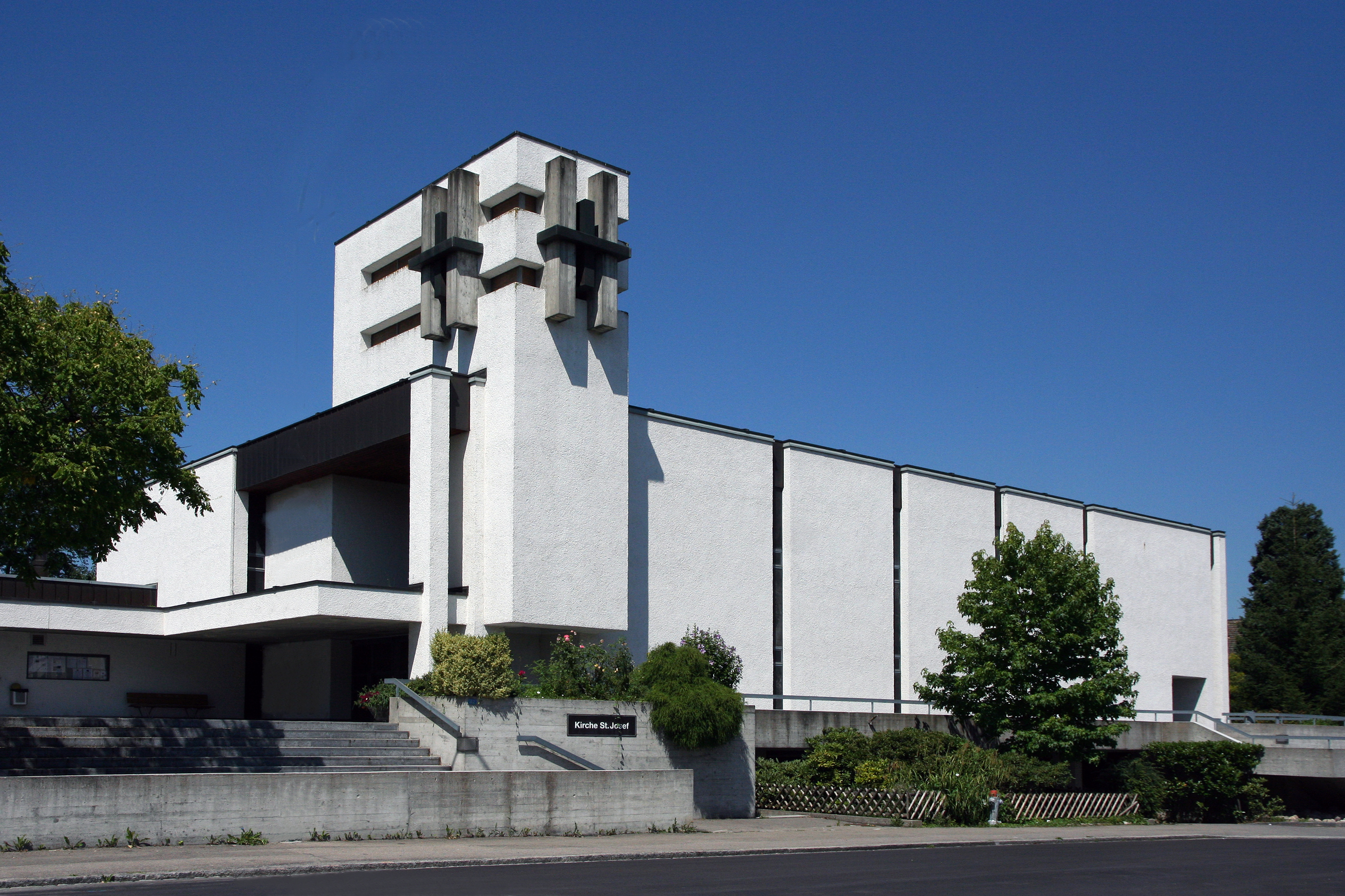 Römisch-katholische Pfarrkirche St. Josef Dietikon, Aussenansicht